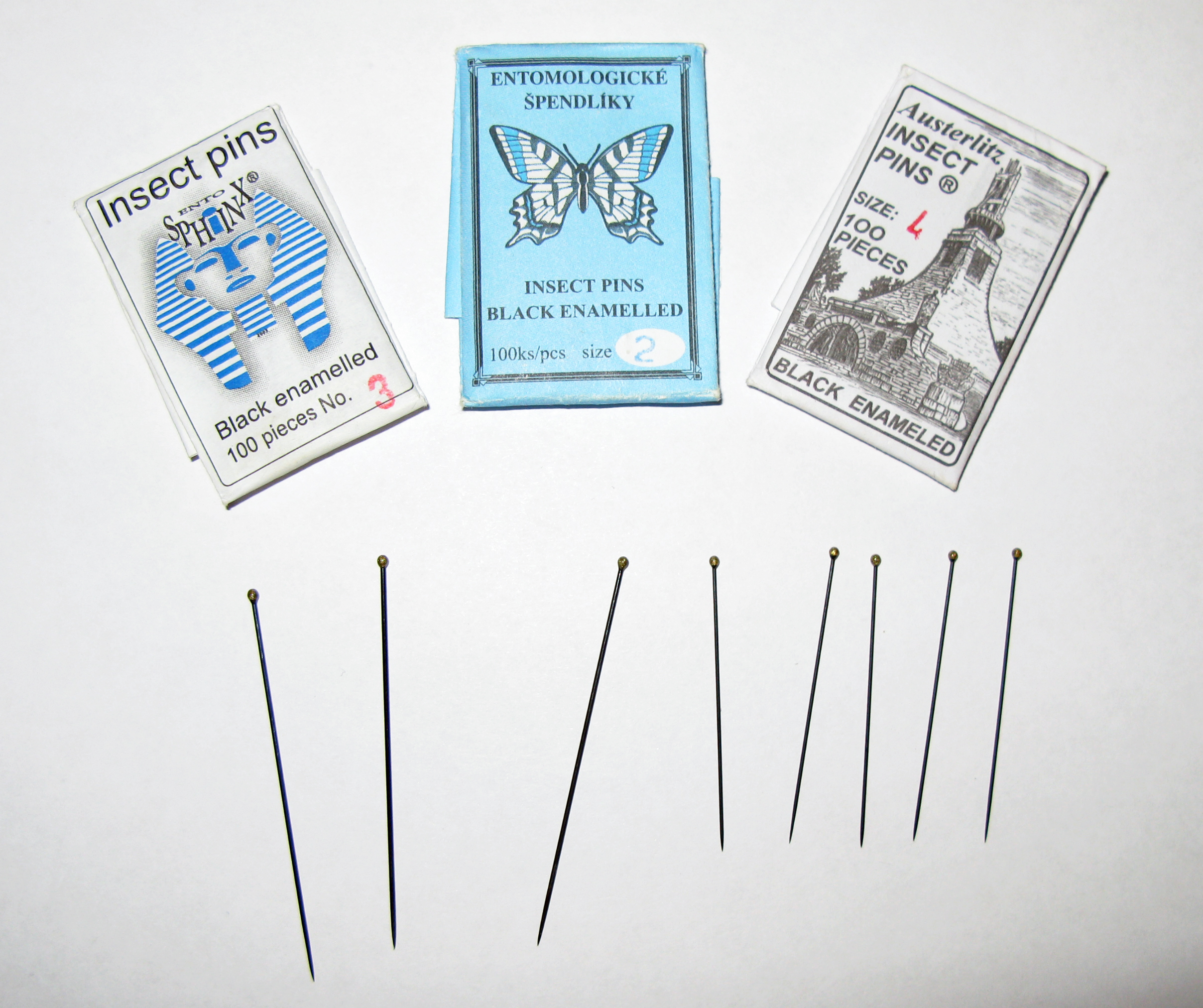 Энтомологические булавки различных производителей и номеров. Entomological Pin There are sizes from OOO,OO,O,1,2,3,4,5,6,7. OOO is used for tiny insects only 7 is used for very large beetles only.